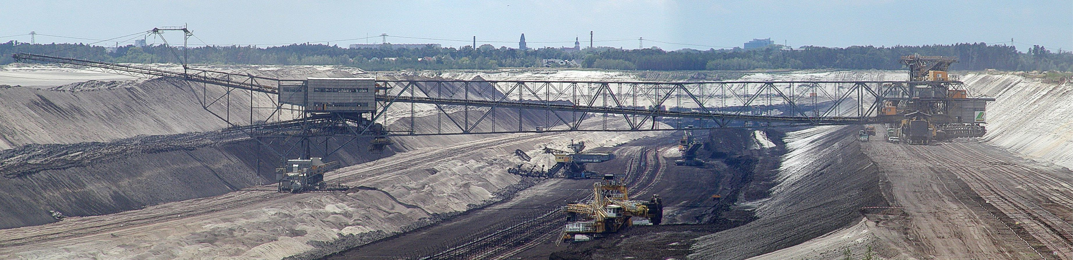 Ein Panorama des Tagebaus Cottbus-Nord